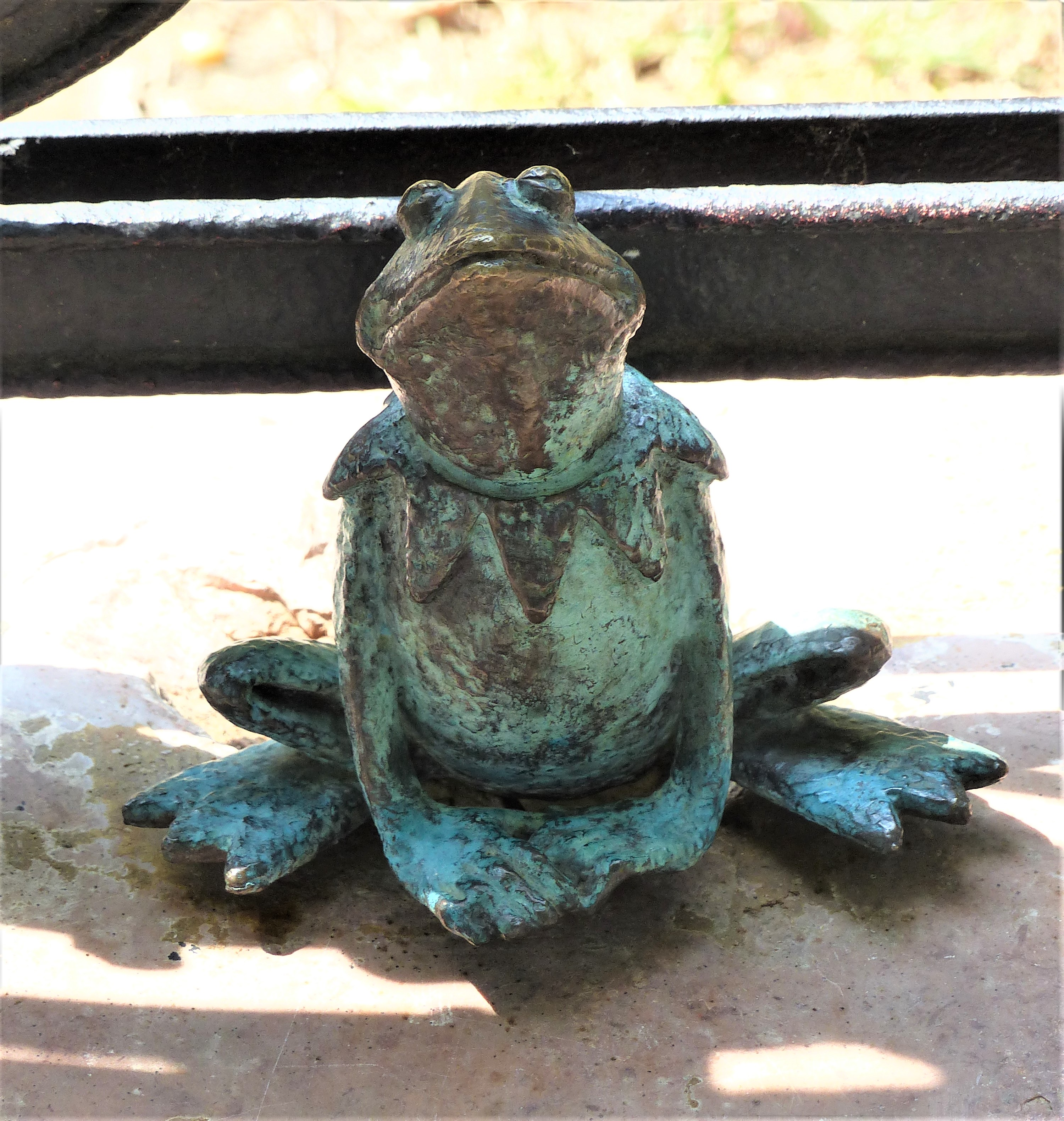 Breki. Kolodko Mihály (Mihajlo Kolodko) szobra. A felvétel a Tőzsdepalotánál, a Szabadság téren készült, Budapesten.